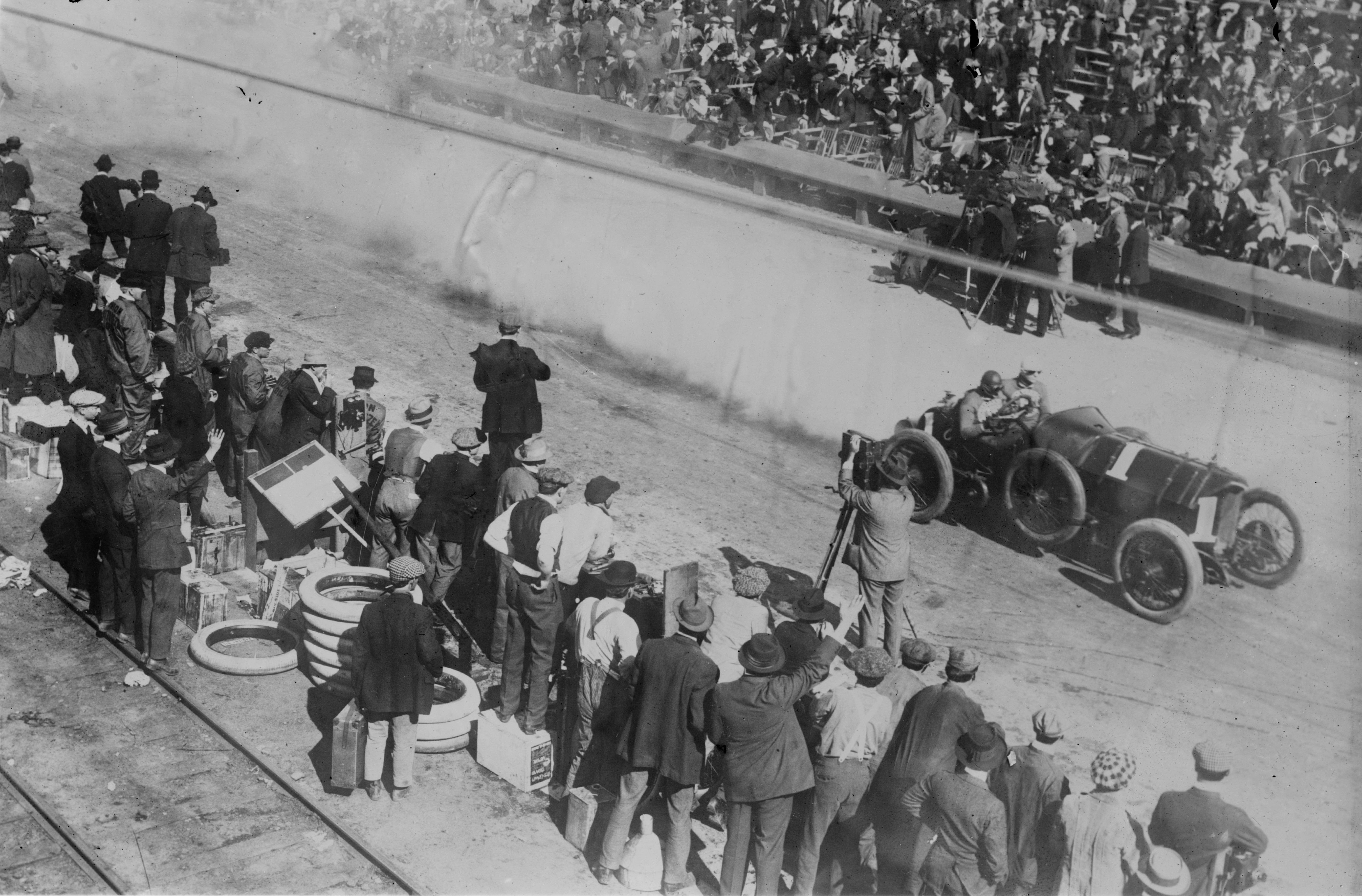 Vanderbilt Cup Race, 1914